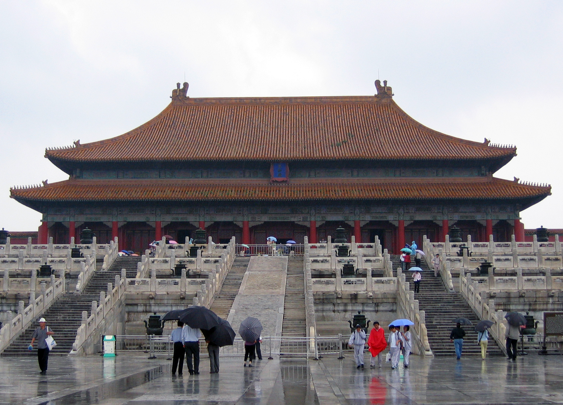 北京故宮 以Canon A80攝於2004年9月14日下午。下雨天 T_T。